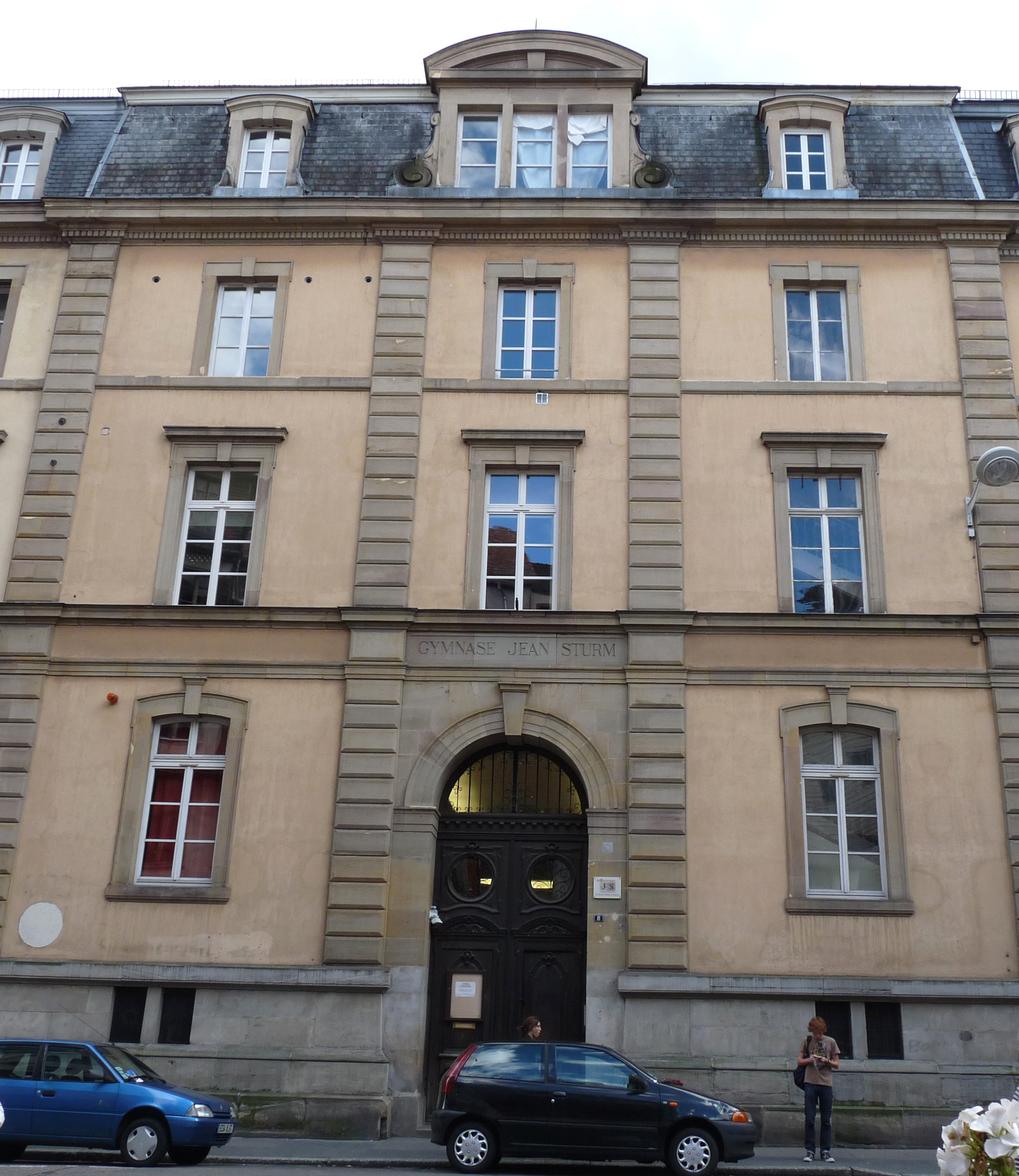 Gymnase Jean-Sturm à Strasbourg